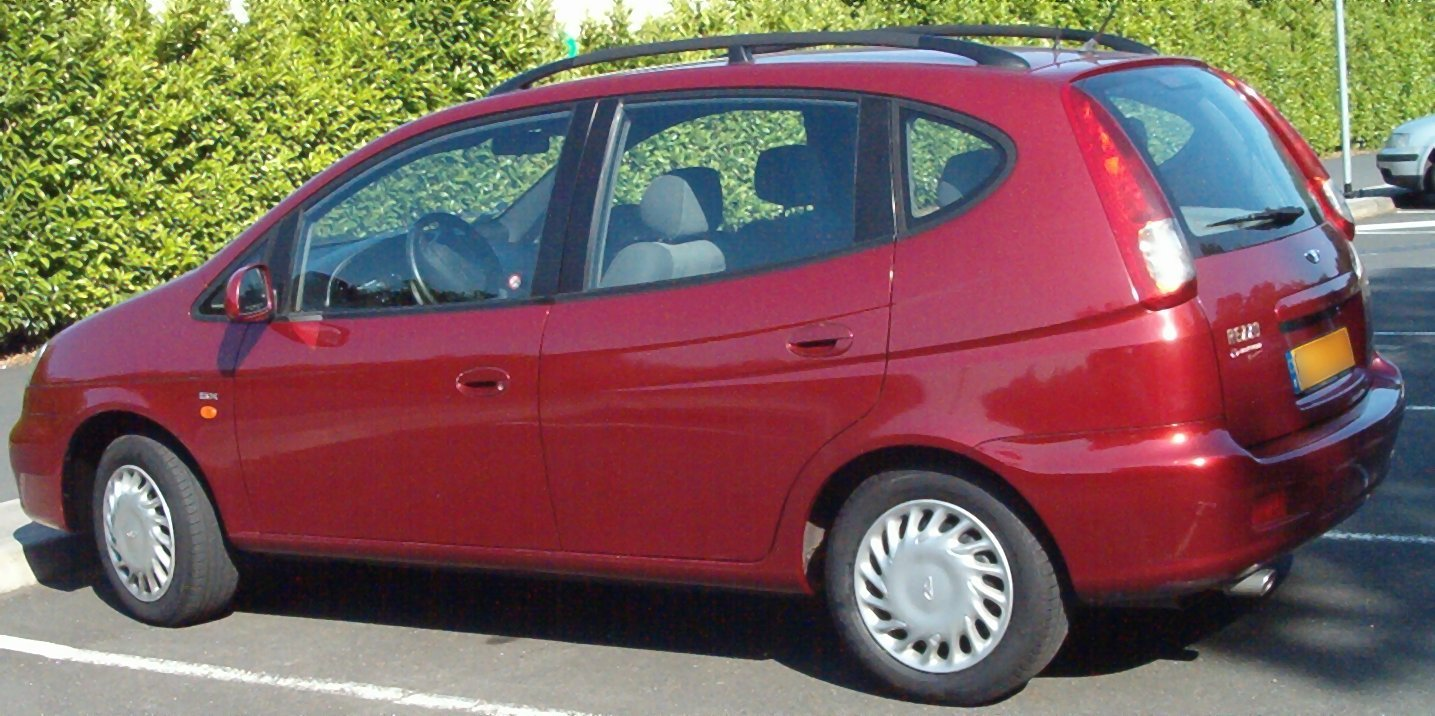 Monospace Daewoo Rezzo GPL